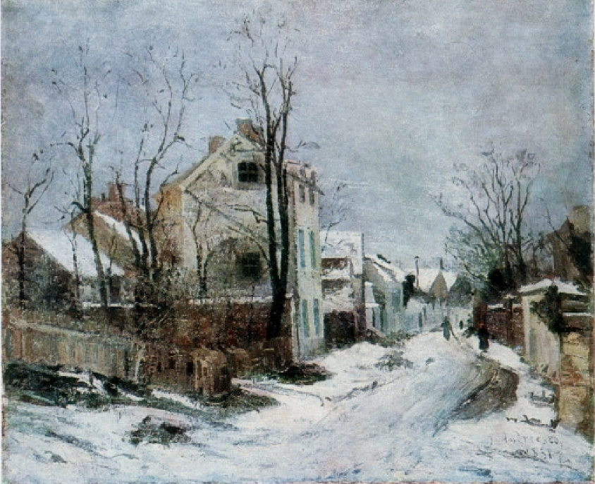 Iarna la Barbizon